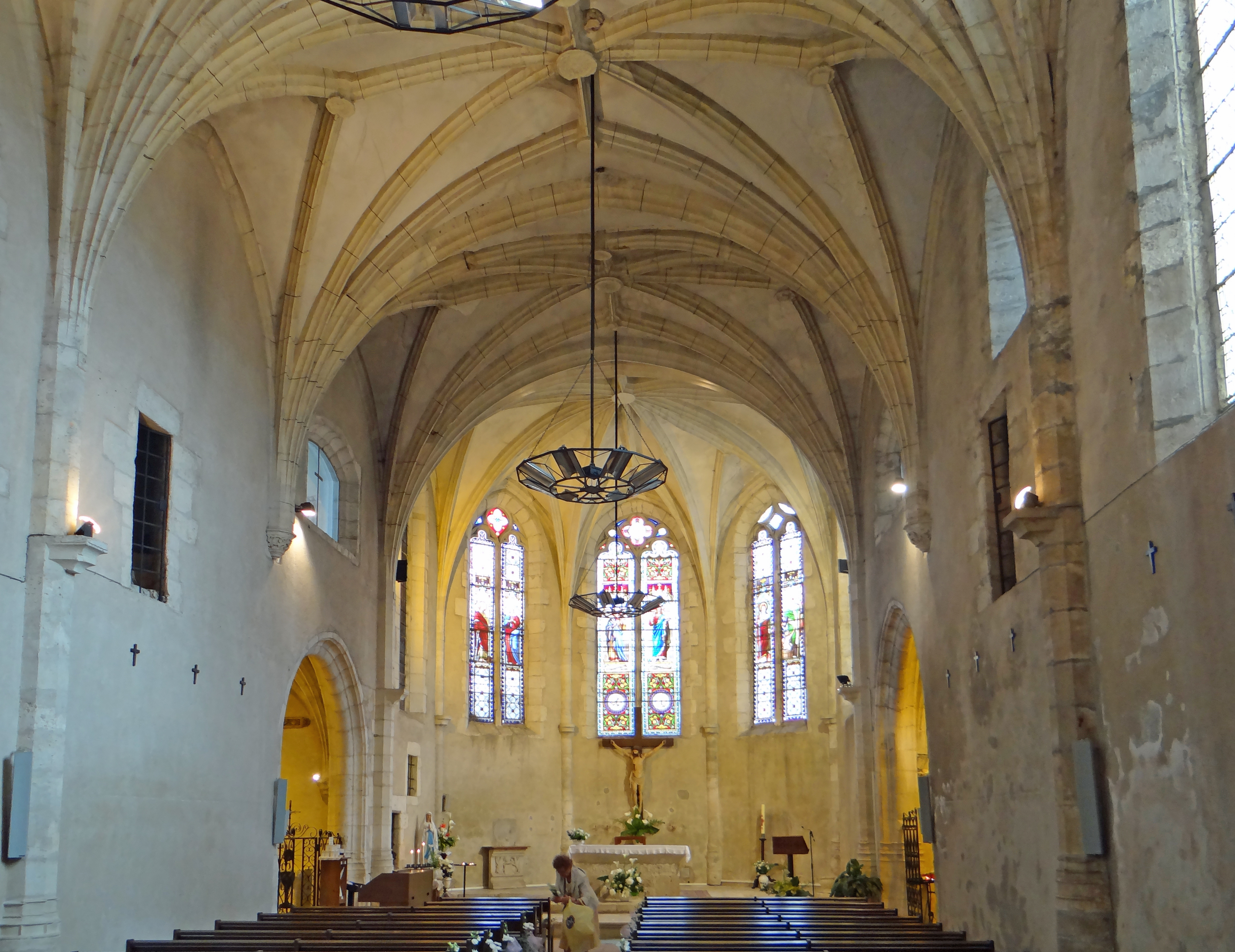 Pujols - Église Saint-Nicolas - Nef et choeur